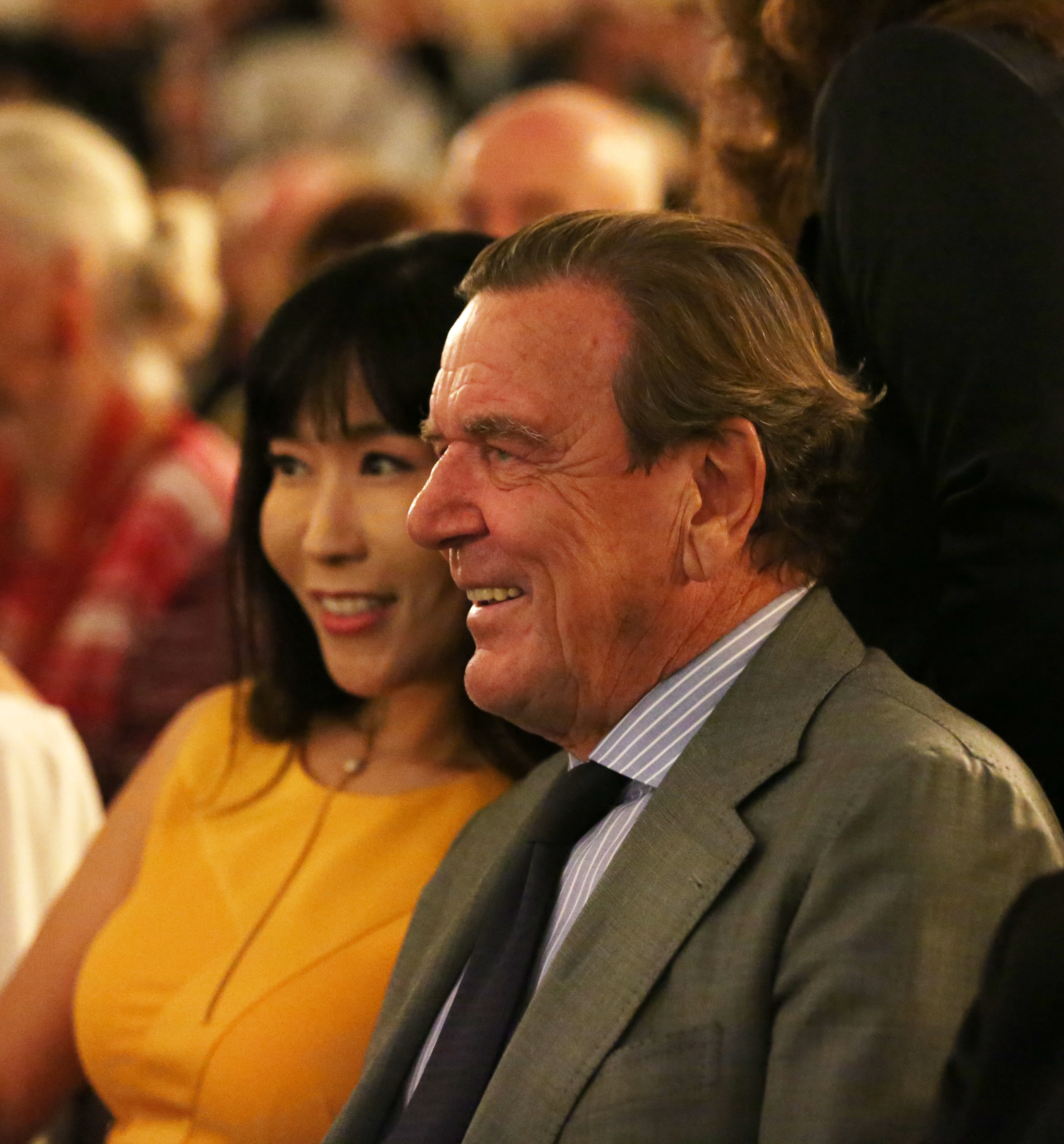 Soyeon Kim und Gerhard Schröder bei der Vernissage der Immendorff-Retrospektive im Haus der Kunst, München, 2018-09-13